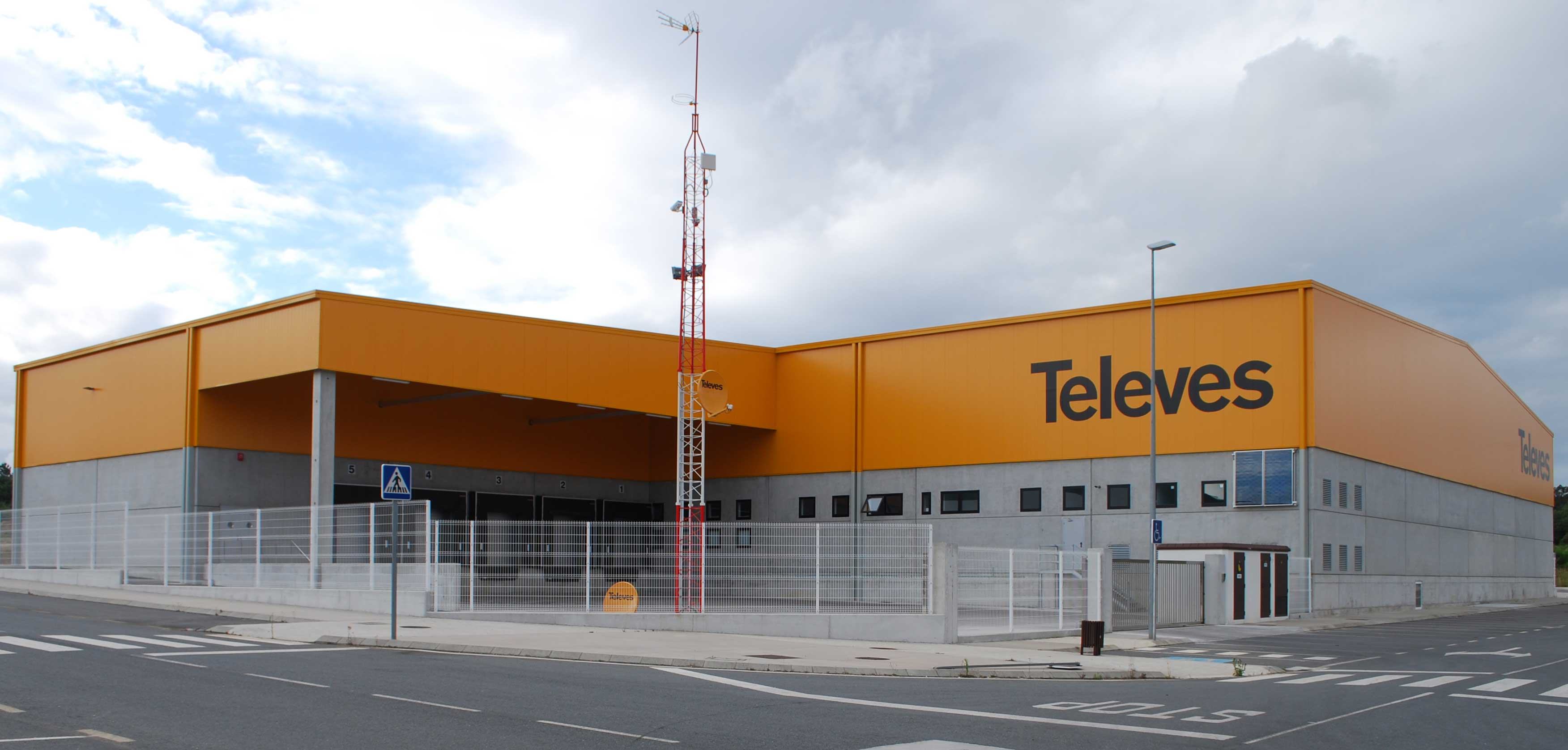 Centre logistique de l'entreprise Televés à Oroso (Galice Espagne) .